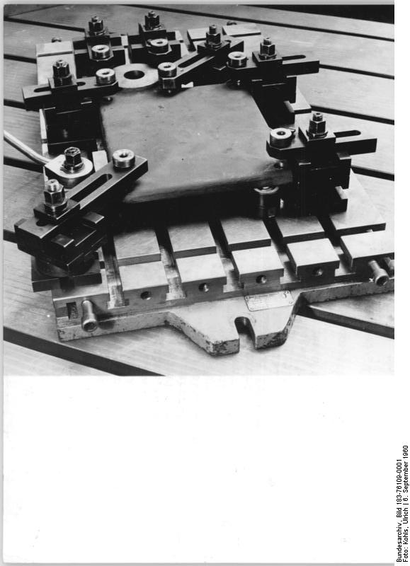 Zentralbild-Kohls-Ks-Qu-3327.A.-V.6.9.1960-Werktätige des Fritz-Heckert-Werk-Karl-Marx-Stadt verwirklichen das 9.Plenum-Mit viel Initiative und Elan sind die Werktätigen des Fritz-Heckert-Werks in Karl-Marx-Stadt an die Verwirklichung der Aufgaben des 9.Plenums gegangen.So konnten sie unter anderem bei der Ausarbeitung des Plans "Neue Technik",bei dem Einsatz von Universalbaukästen im Vorrichtungsbau, in der Arbeit der Kommission für Parteikontrolle und des Arbeitsausschusses der ständigen Produktionsberatungen schon gute Erfolge erzielen.-Eine sozialistische Arbeitsgemeinschaft beschäftigt sich seit dem 1.5.1960 mit dem Einsatz und der Erprobung des vom Zentralinstitut für Fertigungstechnik Karl-Marx-Stadt entwickelten Vorrichtngsuniversalbaukasten,durch dessen richtige Anwendung sich eine erhebliche Einsparung von Konstruktions-und Fertigungskapazität und Material bei schnellster Bereitstellung ergibt.Seit dem 1.5.1960 hat die Arbeitsgemeinschaft 35 Vorrichtungen zusammengestellt,allein bei 17 Vorrichtungen konnte eine Einsparung von 4578 DM erreicht werden.UBz: Eine aus dem Universalbaukasten zusammengestellte Vorrichtung."